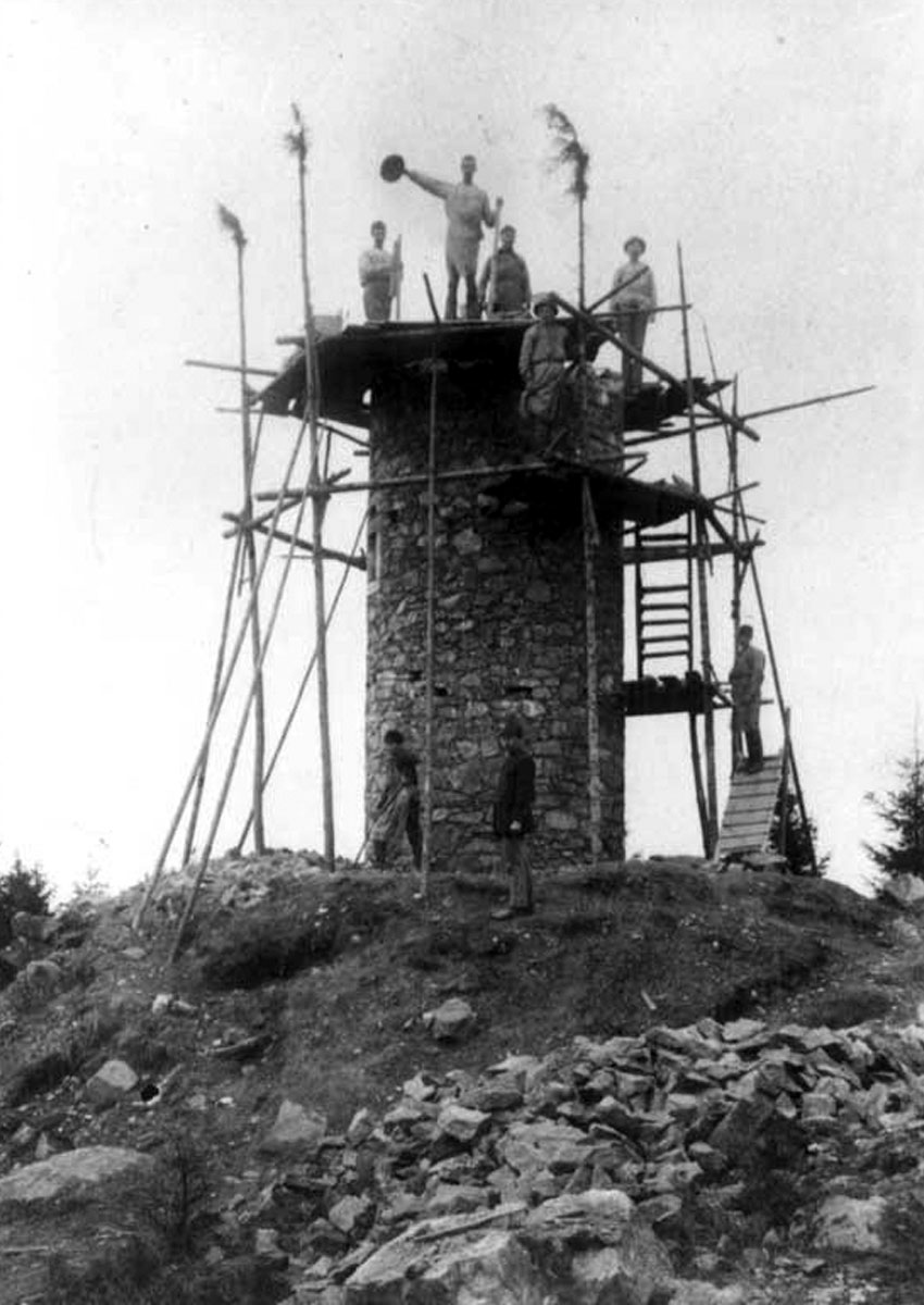 Dieses Bild Zeigt den Bau des Weißensteinturmes von 1898.